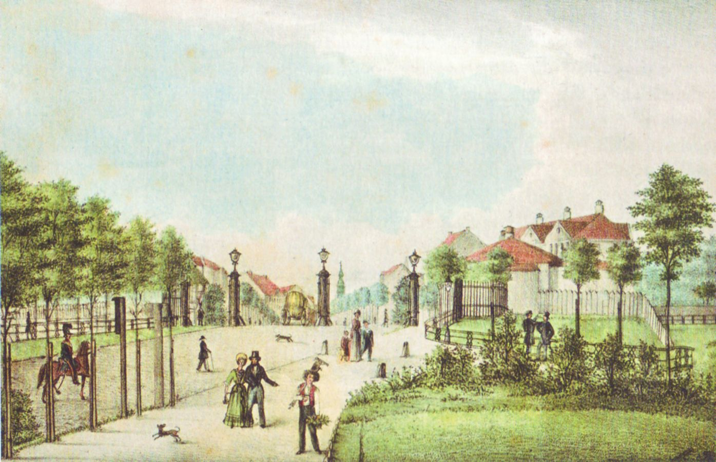 Berliner Thor in Hamburg 1834